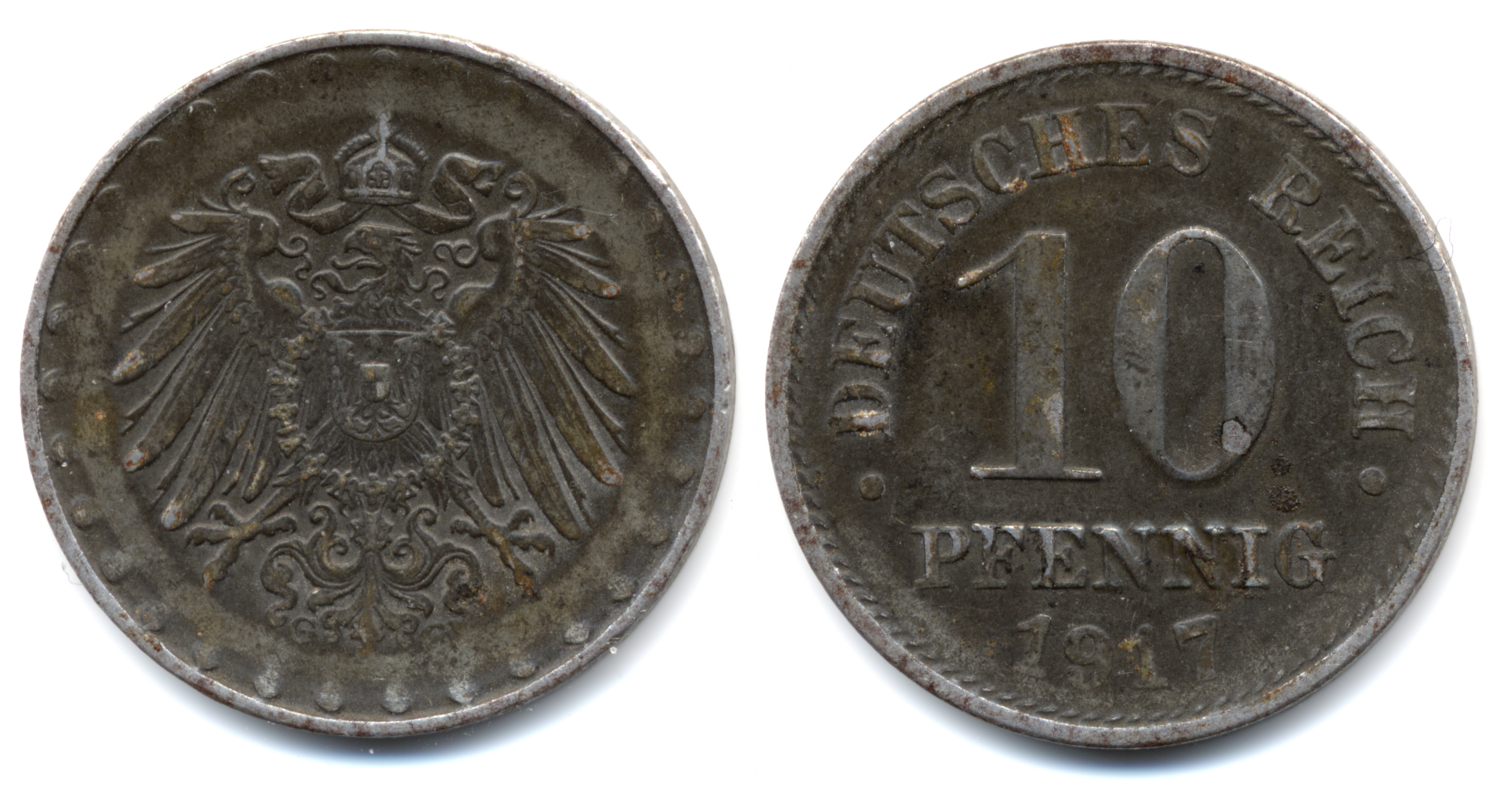 10 Pfennig iron coin Deutsches Reich 1917